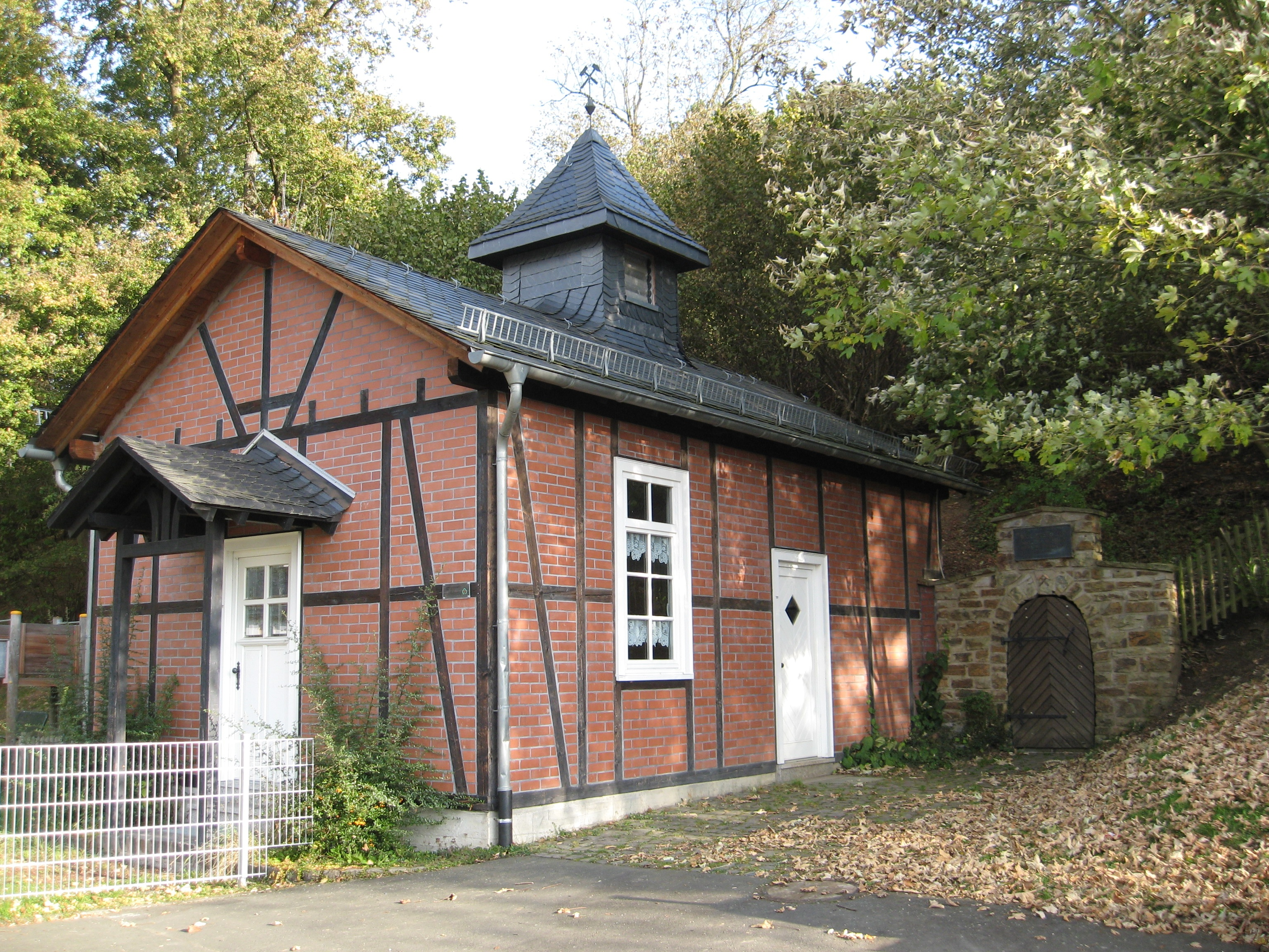 Der Wodanstolln mit Stollenhäuschen in Salchendorf (Neunkirchen) im Siegerland (NRW).